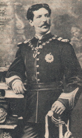 Alexandre Alberto da Rocha de Serpa Pinto (1846-1900) was a Portuguese military, explorer and colonial administrator.